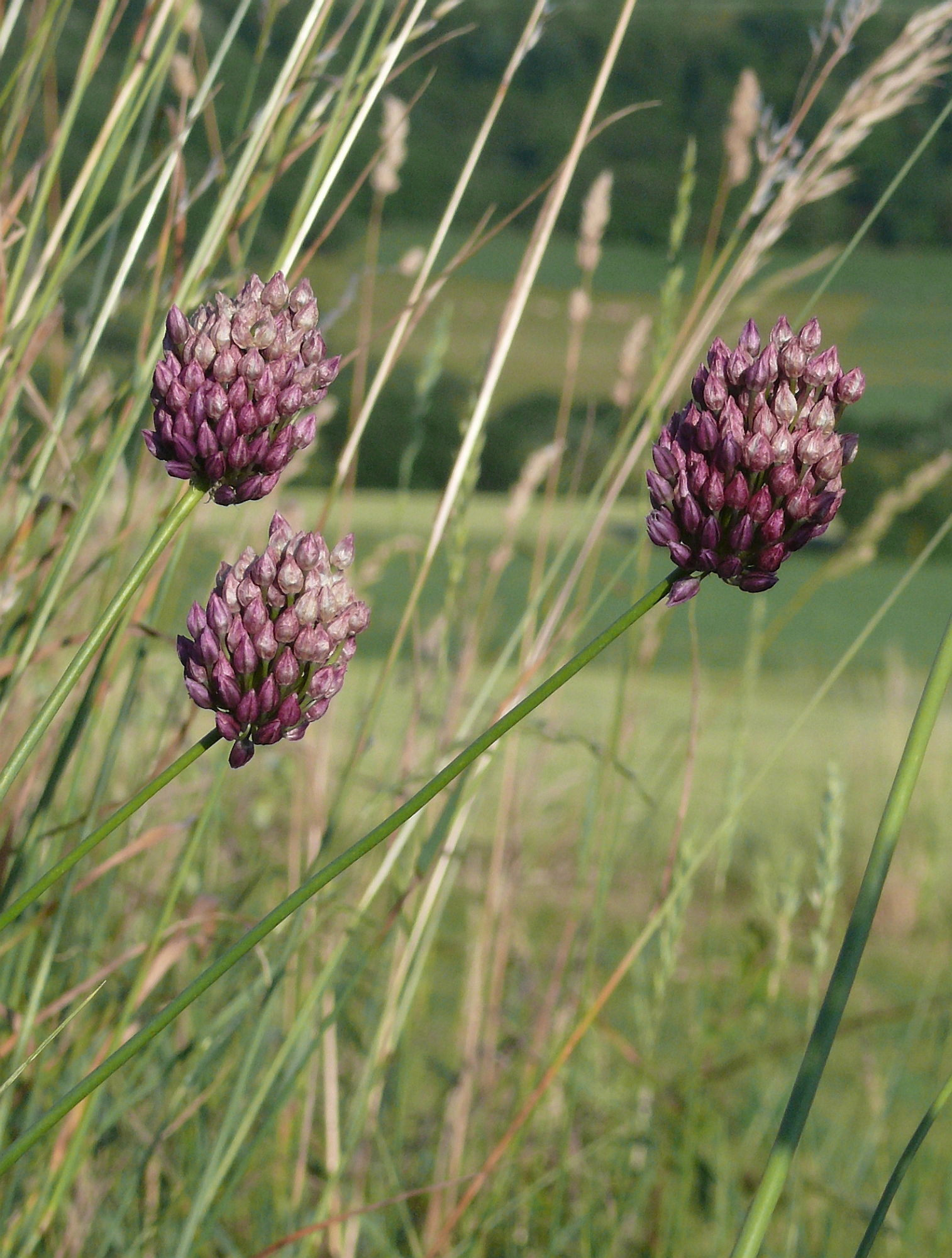 Allium rotundum, Hohenlohe, Deutschland